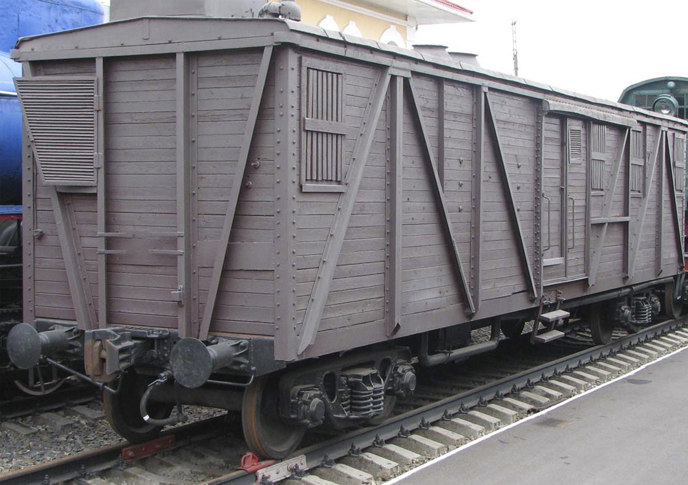 Вагон построен в 1950 году